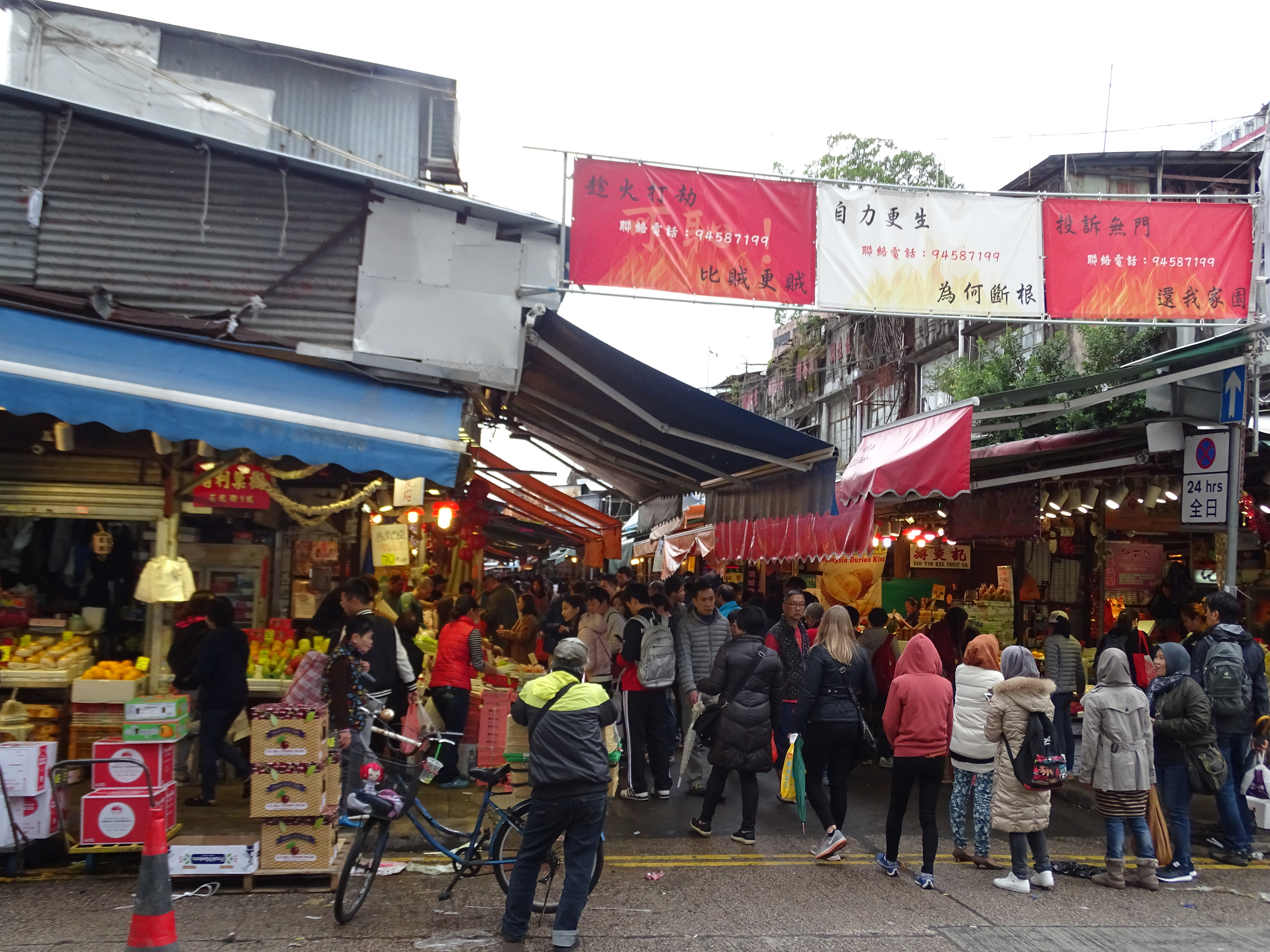 Obstmarkt Yau Ma Tei Fruit Market, Shek Lung Stree / Reclamation Street, Bezirk Yau Ma Tei, Kowloon, Hong Kong